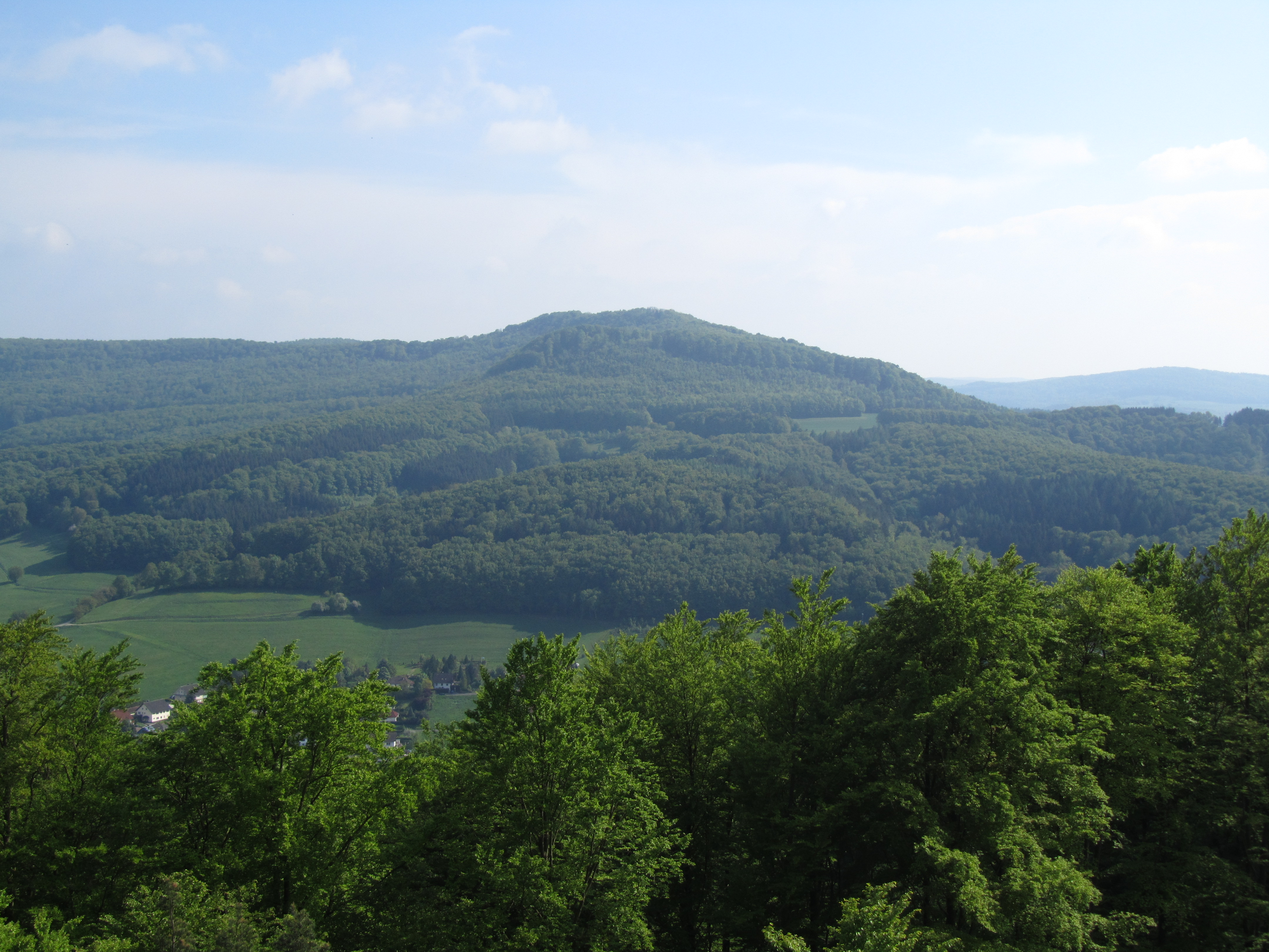 Der Berg Boyneburg (513 m) von Norden (Berliner Turm)